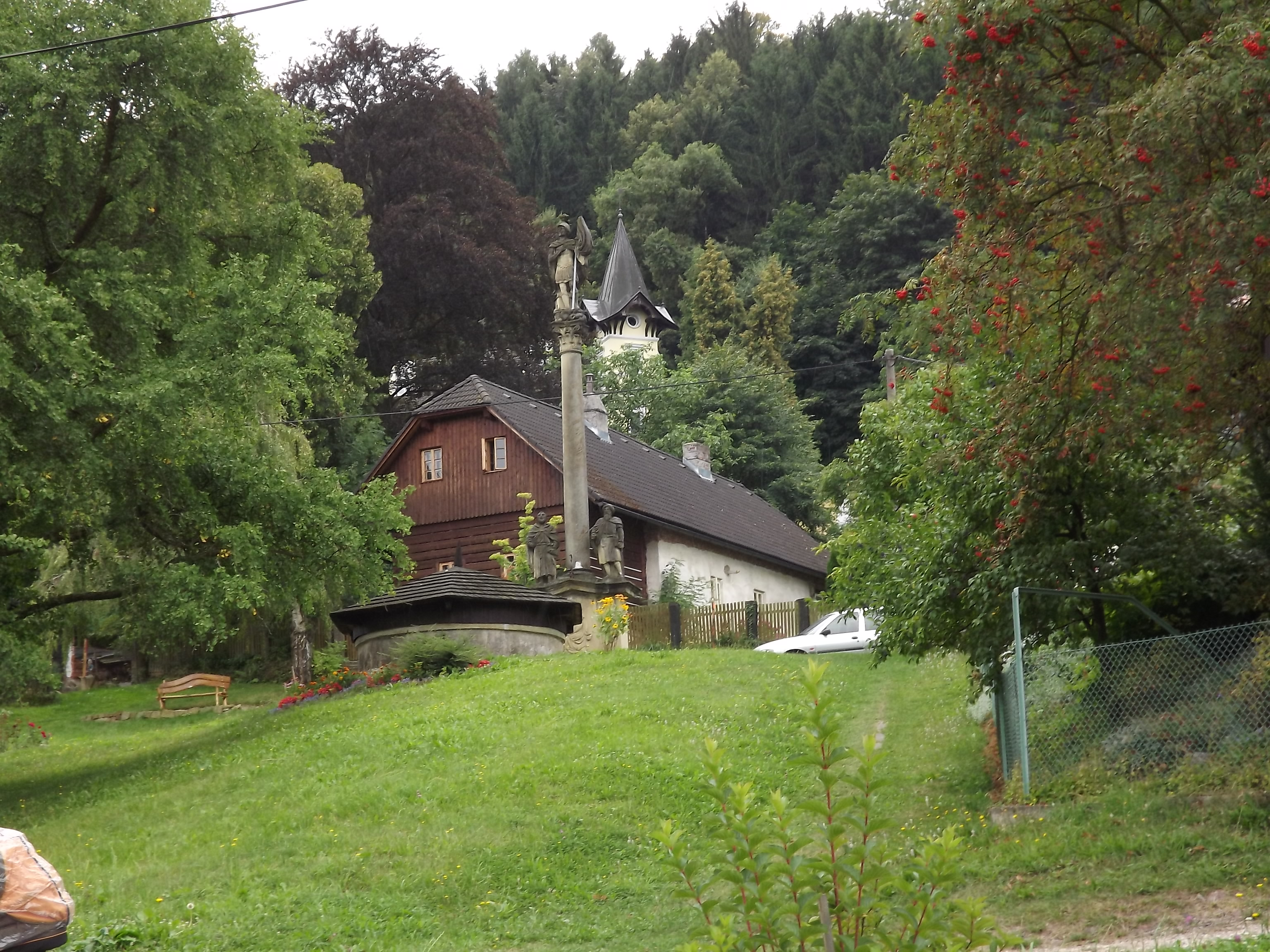 POtštejn